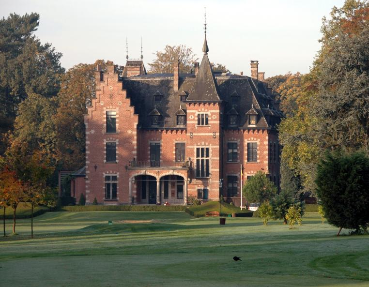 Chateau de l'Hermite